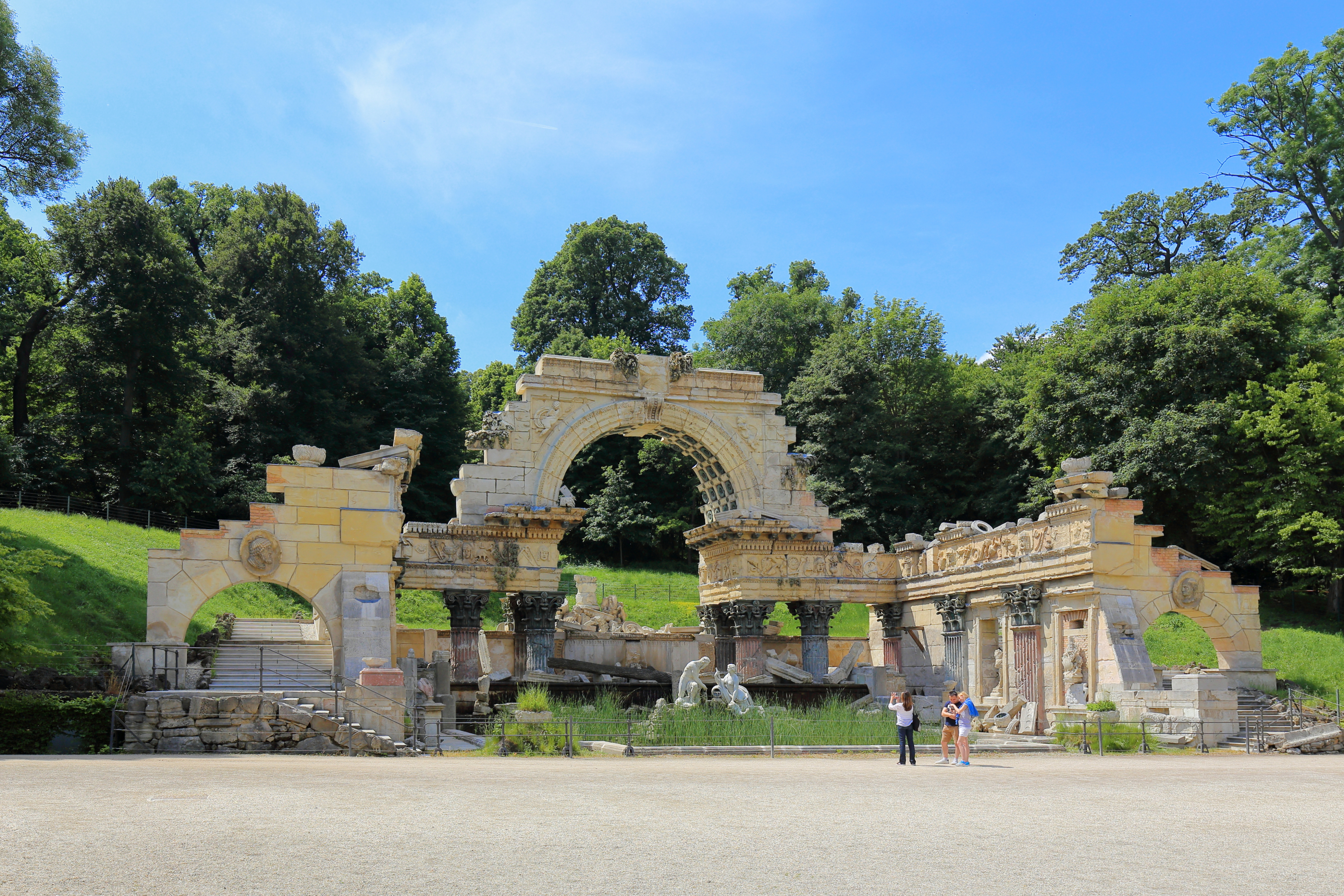 Die Follyanlage „römische Ruine“ im Schönbrunner Schloßpark im 13. Wiener Gemeindebezirk Hietzing.Das ursprünglich als „Ruine von Karthago“ bezeichnete Ensemble wurde linksseitig am Fuße des bewaldeten Schönbrunner Berges nach Plänen von Johann Ferdinand Hetzendorf von Hohenberg im Jahre 1778 errichtet. Es ist ein vollständigen Neubau nach dem römischen Vorbild des antiken Vespasian und Titus-Tempels, dessen Überreste durch den um 1756 entstandenen Stich von Giovanni Battista Piranesi überliefert waren. Im Bassin vor der Ruine befindet sich eine Figurengruppe der Flussgötter Donau und Enns, die Wilhelm Beyer schuf. Die Steindekorationen wurden von dem Vorgenannten und den Bildhauern Benedikt Henrici sowie Franz Zächerle angefertigt.